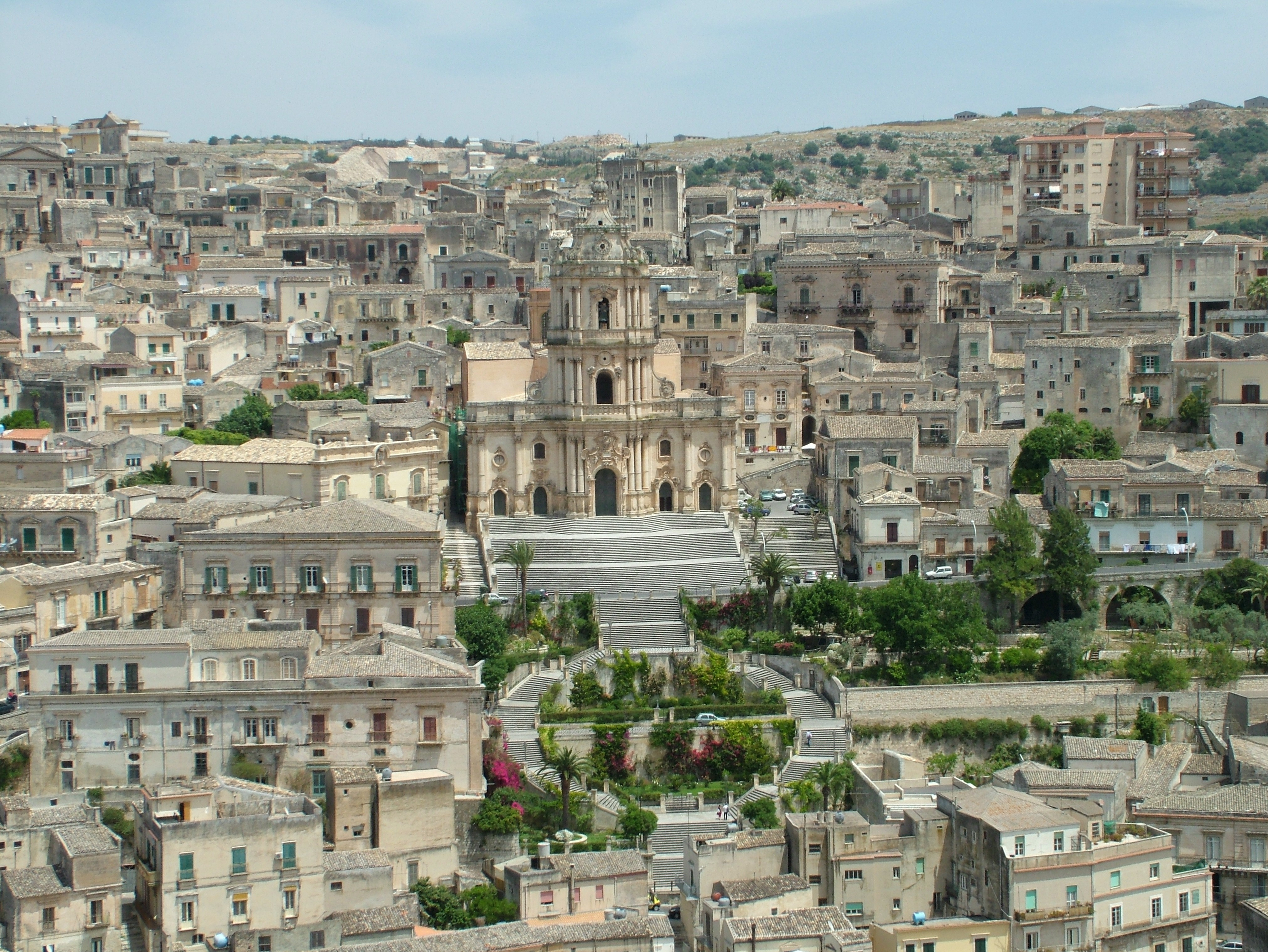 Modica, Sizilien, La chiesa die S. Giorgio mit der Treppe (250 Stufen)